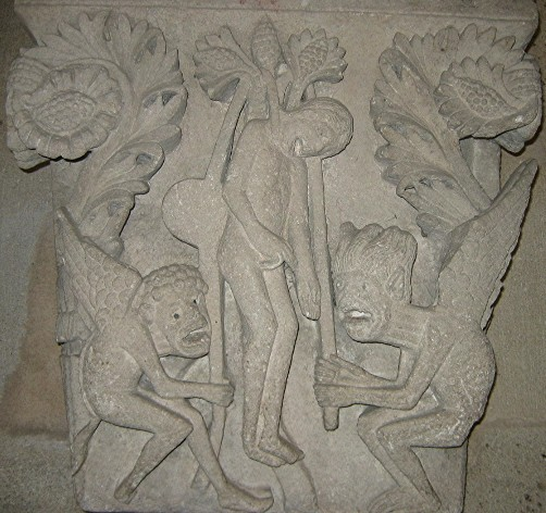 Chapiteau de la salle capitulaire, cathédrale d'Autun, France. Pendaison de Juda.